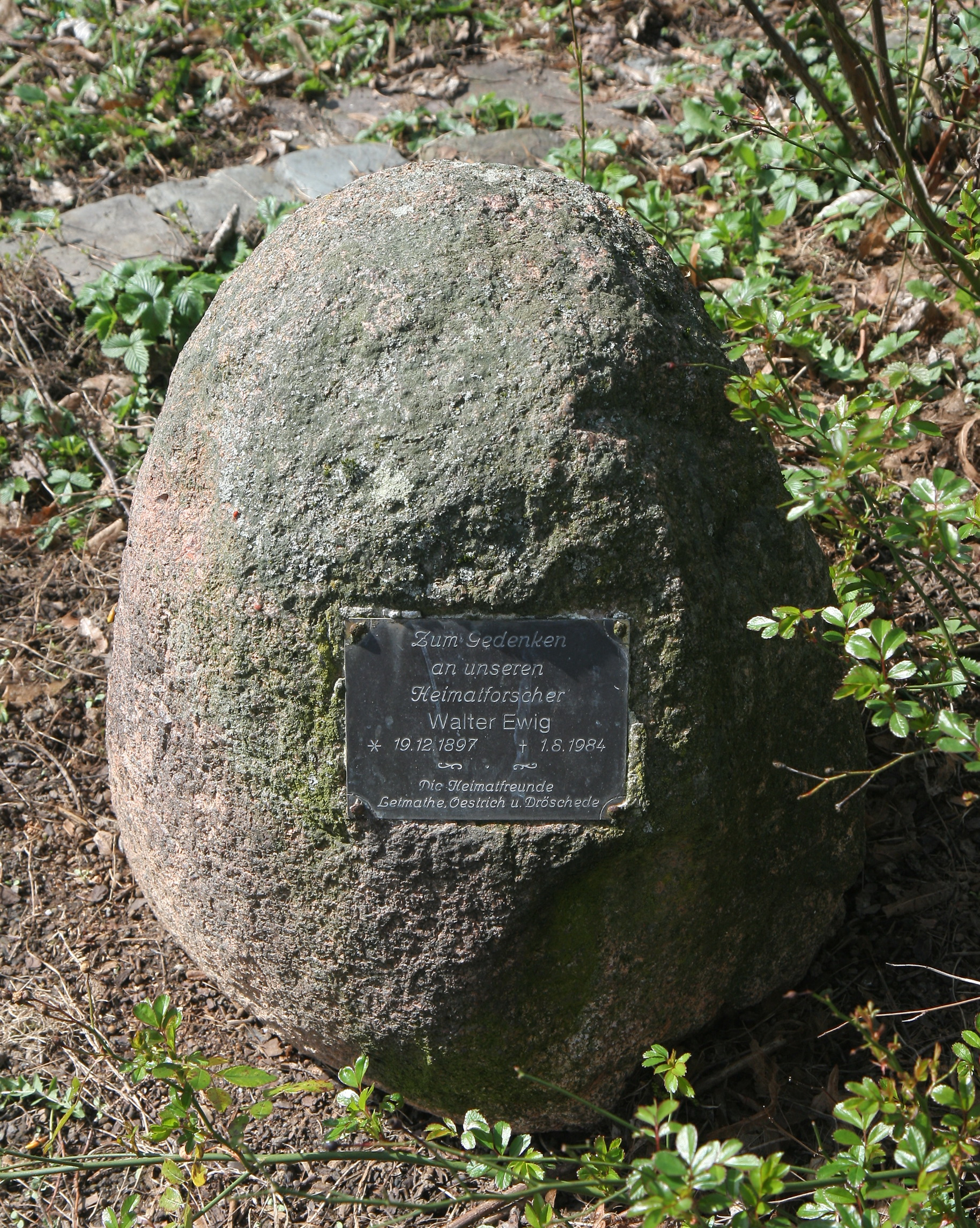 Gedenkstein für Walter Ewig in Iserlohn-Dröschede, Im Hütten.